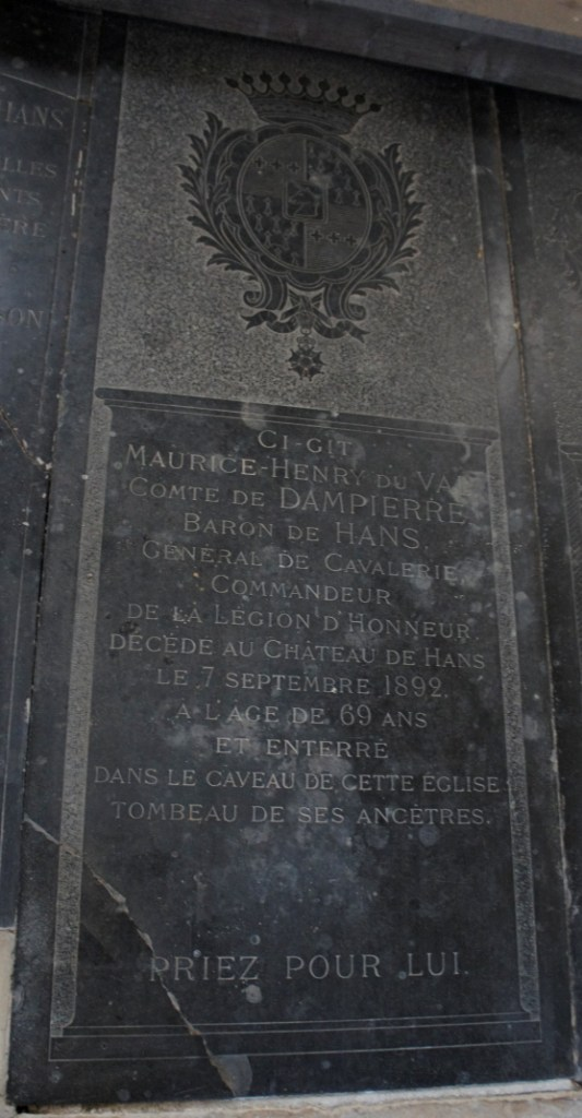 gisant de Maurice Henri Du Val, comte de Dampierre baron de Hans.